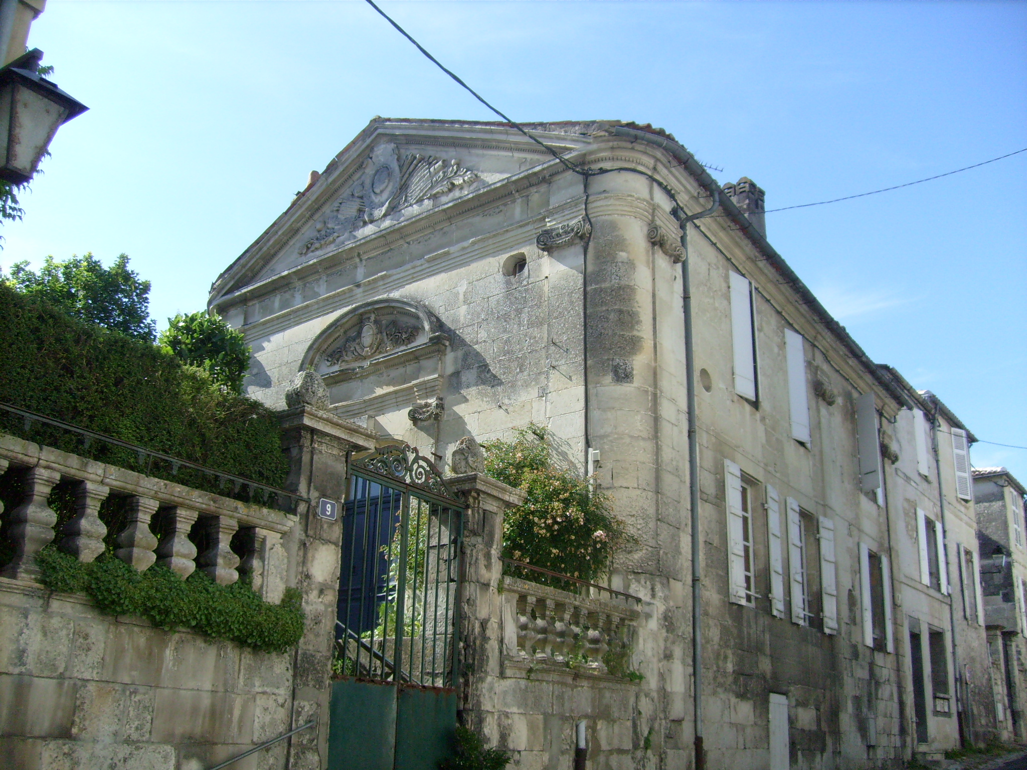 Ancienne faculté de chirurgie de Saintes